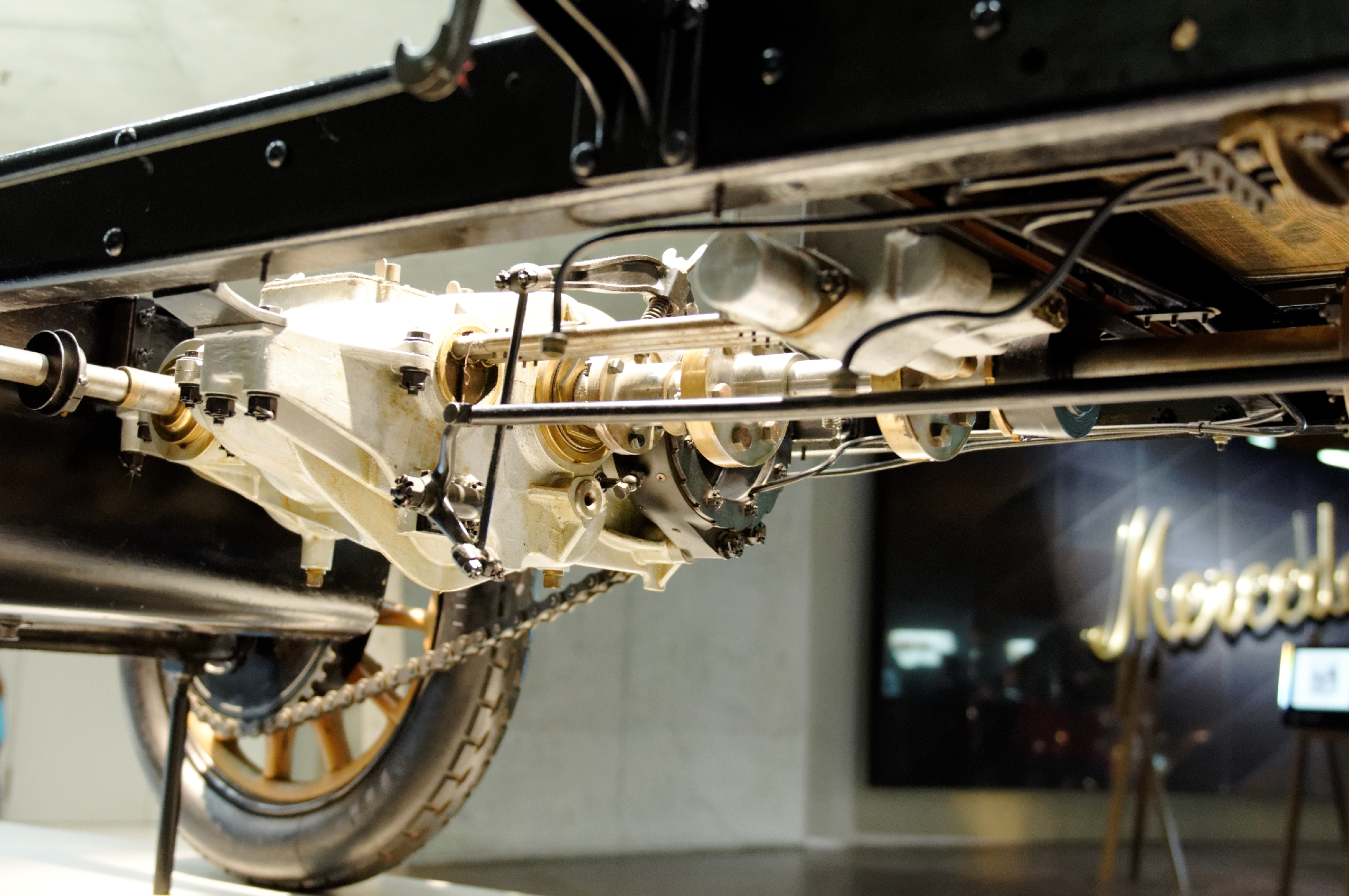 Bilder aus dem Mercedes-Benz-Museum 2015